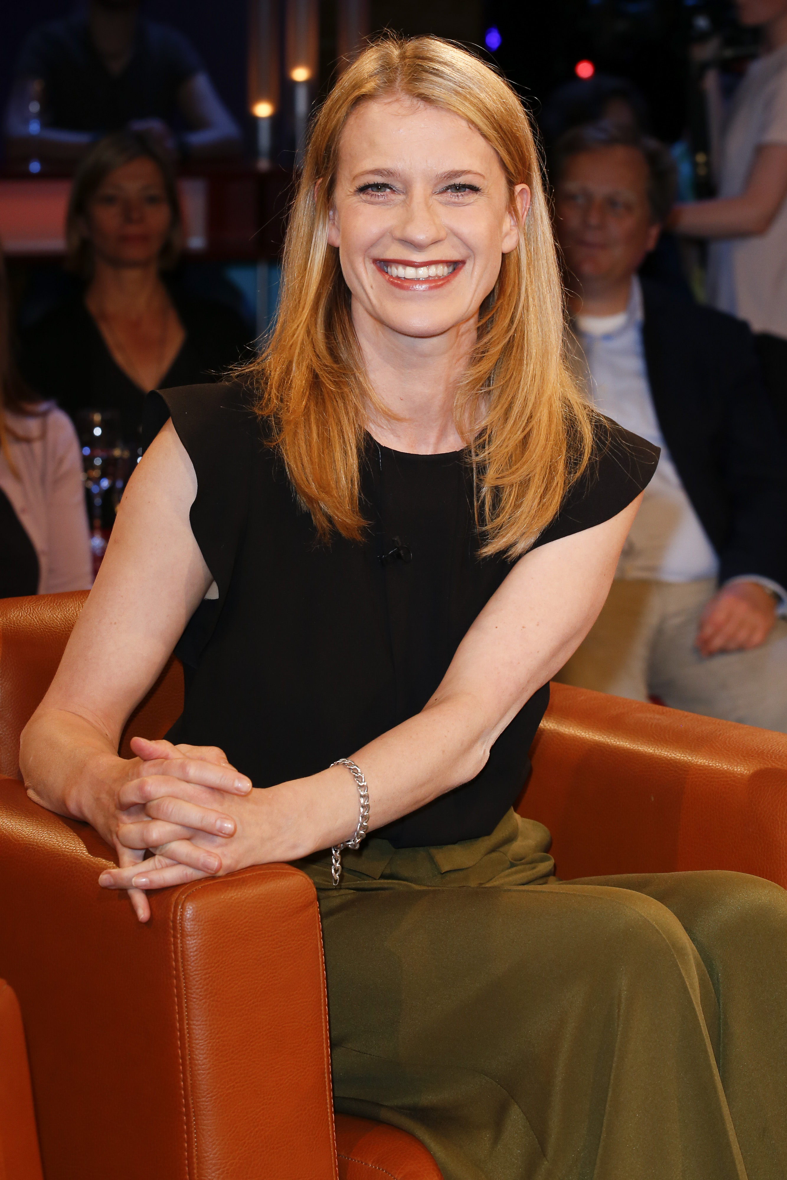 Caroline Peters bei der NDR Talk Show am 03.06.2016 Foto; Jan-Timo Schaube